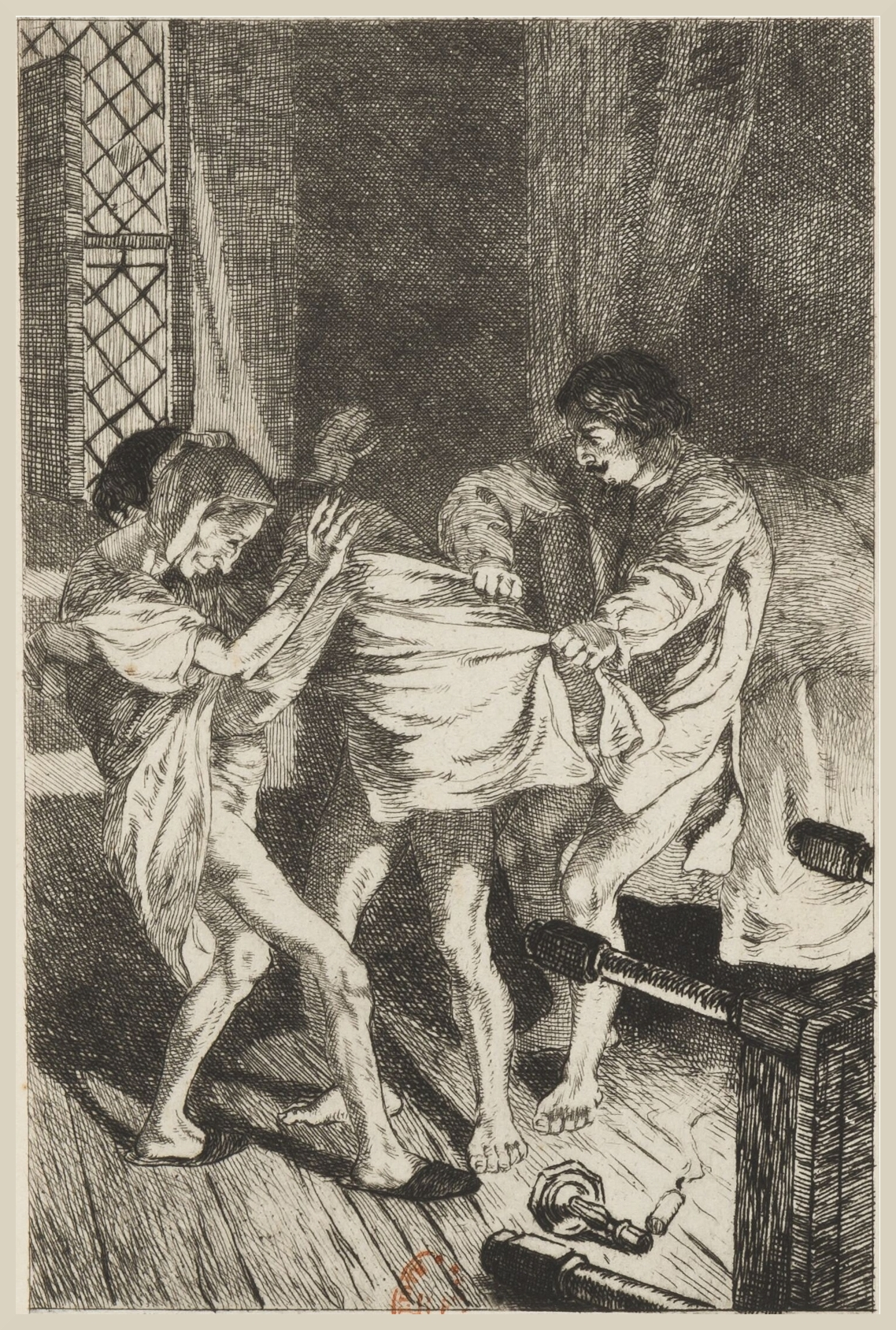 Dessins de Martin van Maele. Martin Van Maele. Illustration extraite de L'Histoire comique de Francion. En laquelle sont découvertes les plus subtiles finesses et trompeuses inventions tant des hommes que des femmes de toutes sortes de conditions et d’âges. de Charles Sorel. Jean Fort, Paris, 1925.